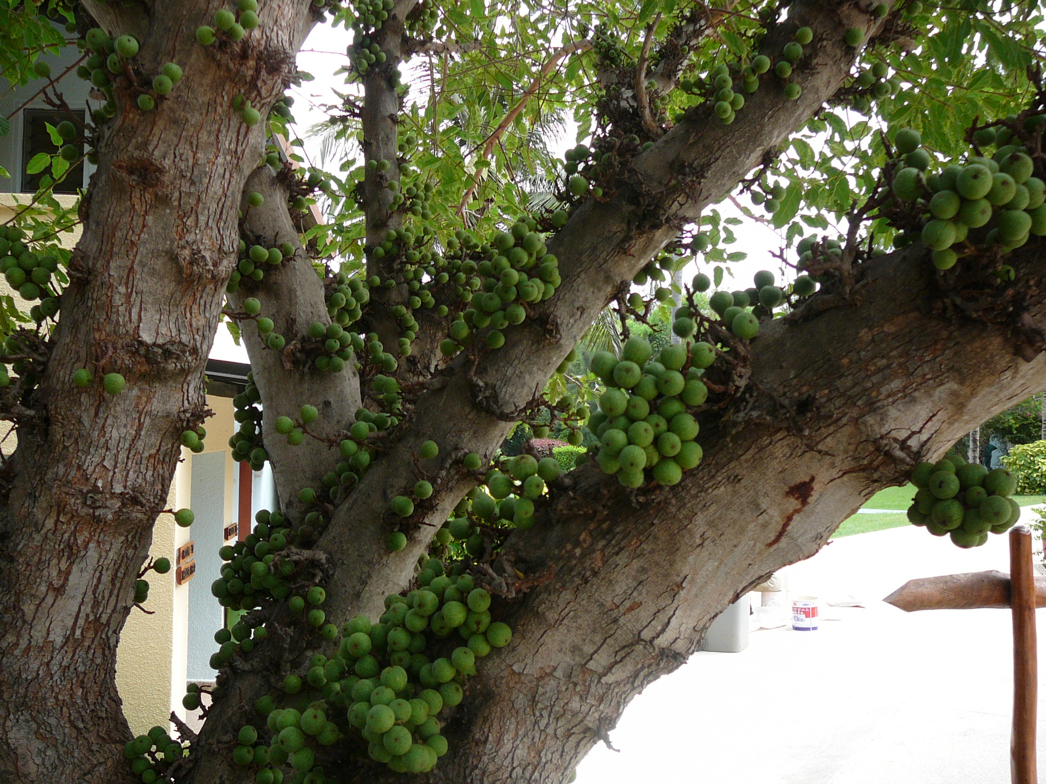 Ficus lutea